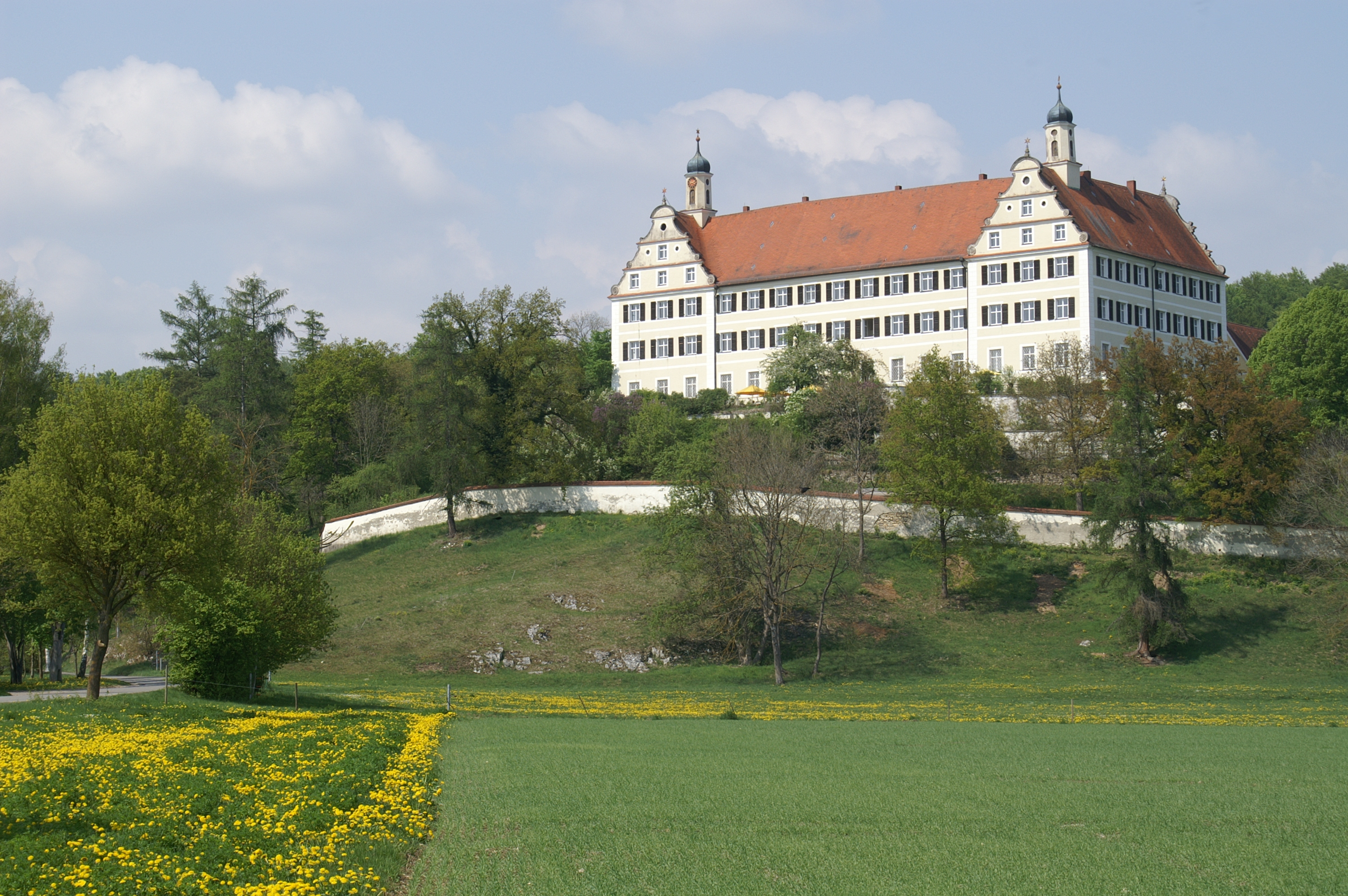 Schloss Mochental im Alb-Donau-Kreis